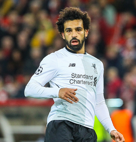 «Спартак» - «Ливерпуль»